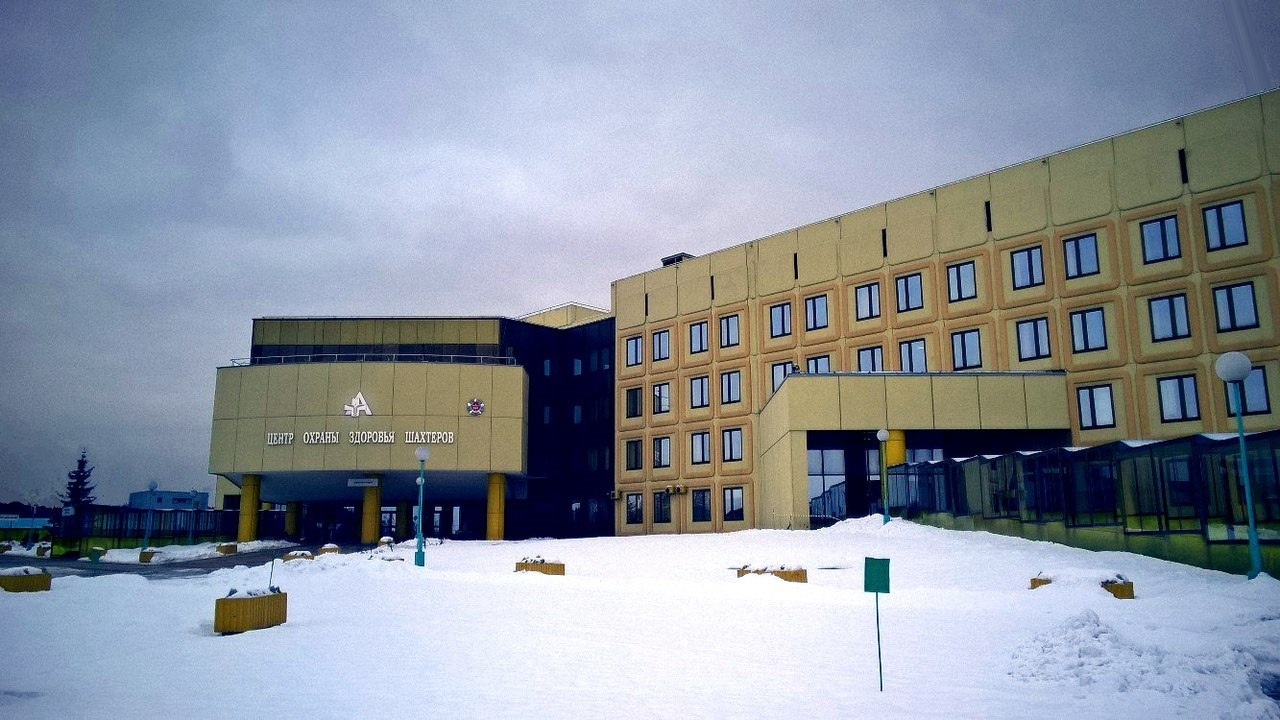 Областной клинический центр охраны здоровья шахтёров, Ленинск-Кузнецкий